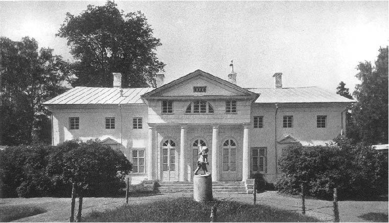 Елизаветино (усадьба Покровское-Стрешнево). "Ванный домик" (не сохранился)